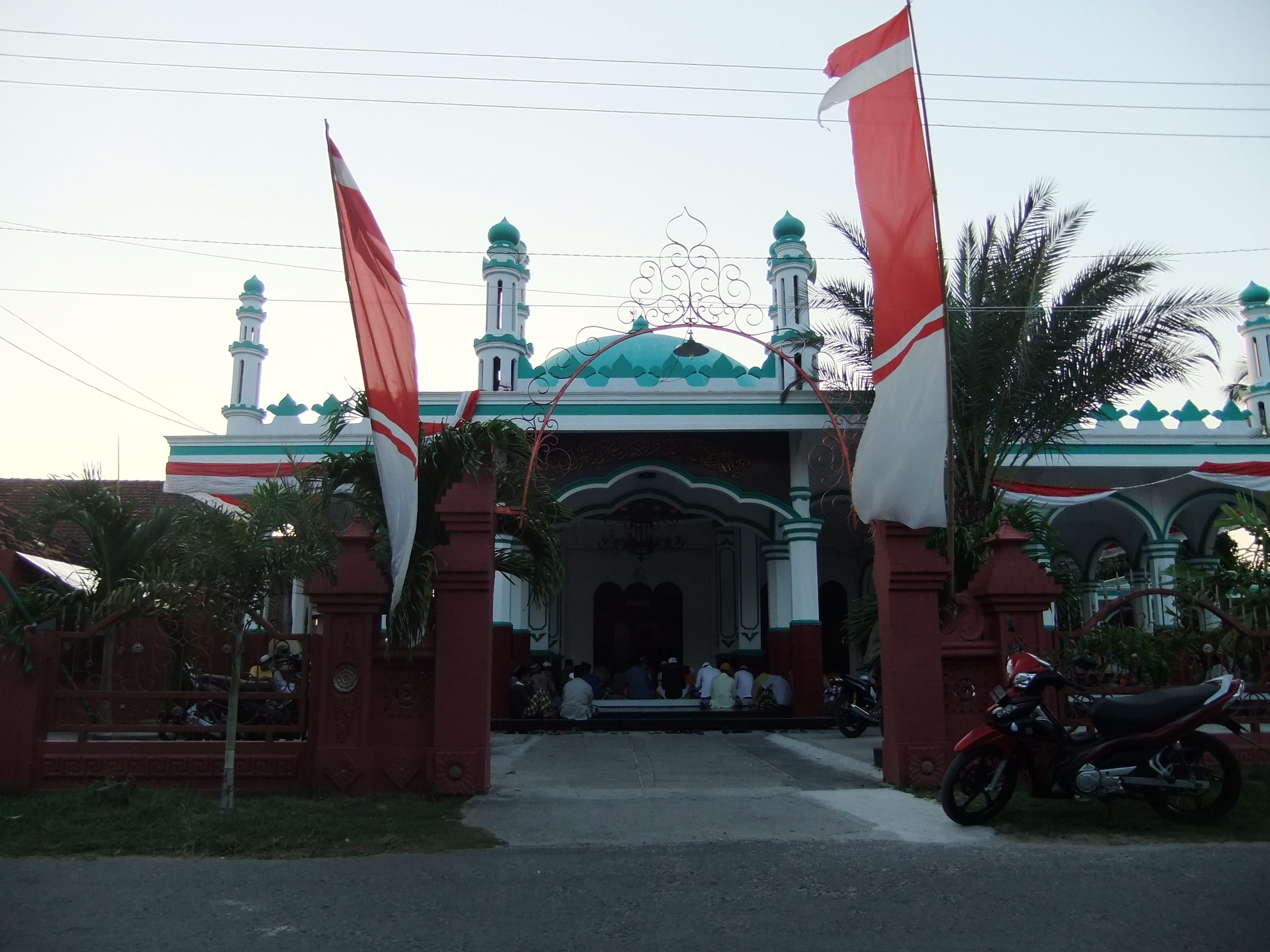 Masjid di Jl Ahmad Dahlan, Karimun Jawa